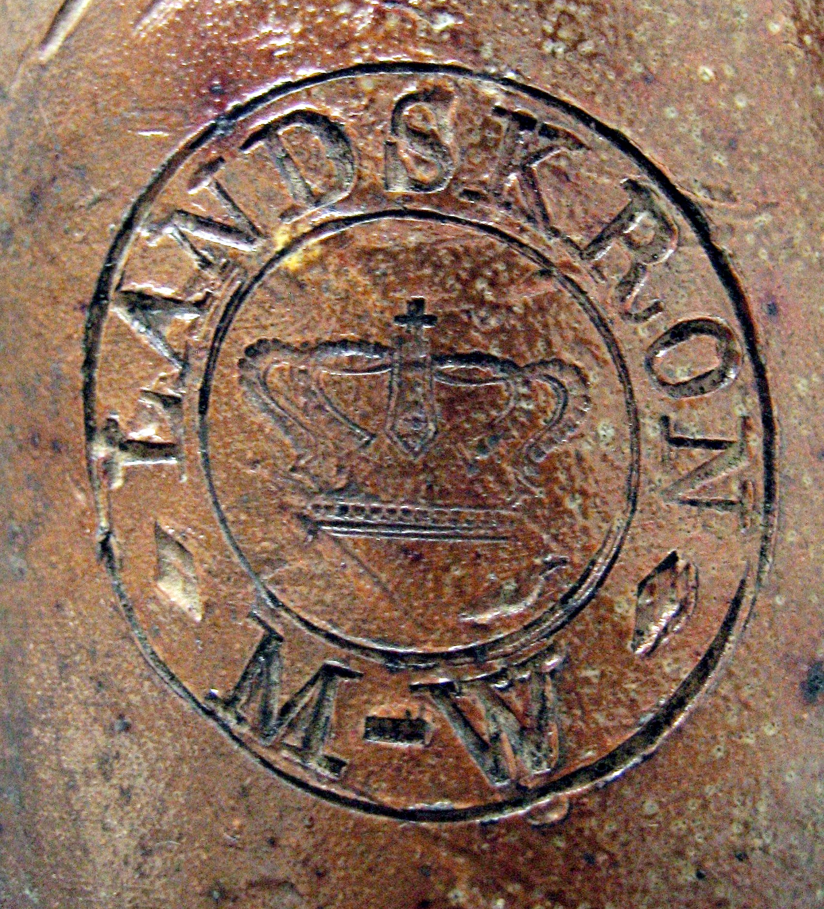 Ausschnitt Krug Landskroner Mineralwasser mit Siegelzeichen Krone